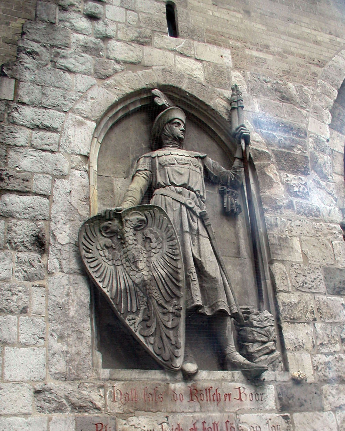 Kölner-Bauer, Eigelsteintor (Ausschnitt)